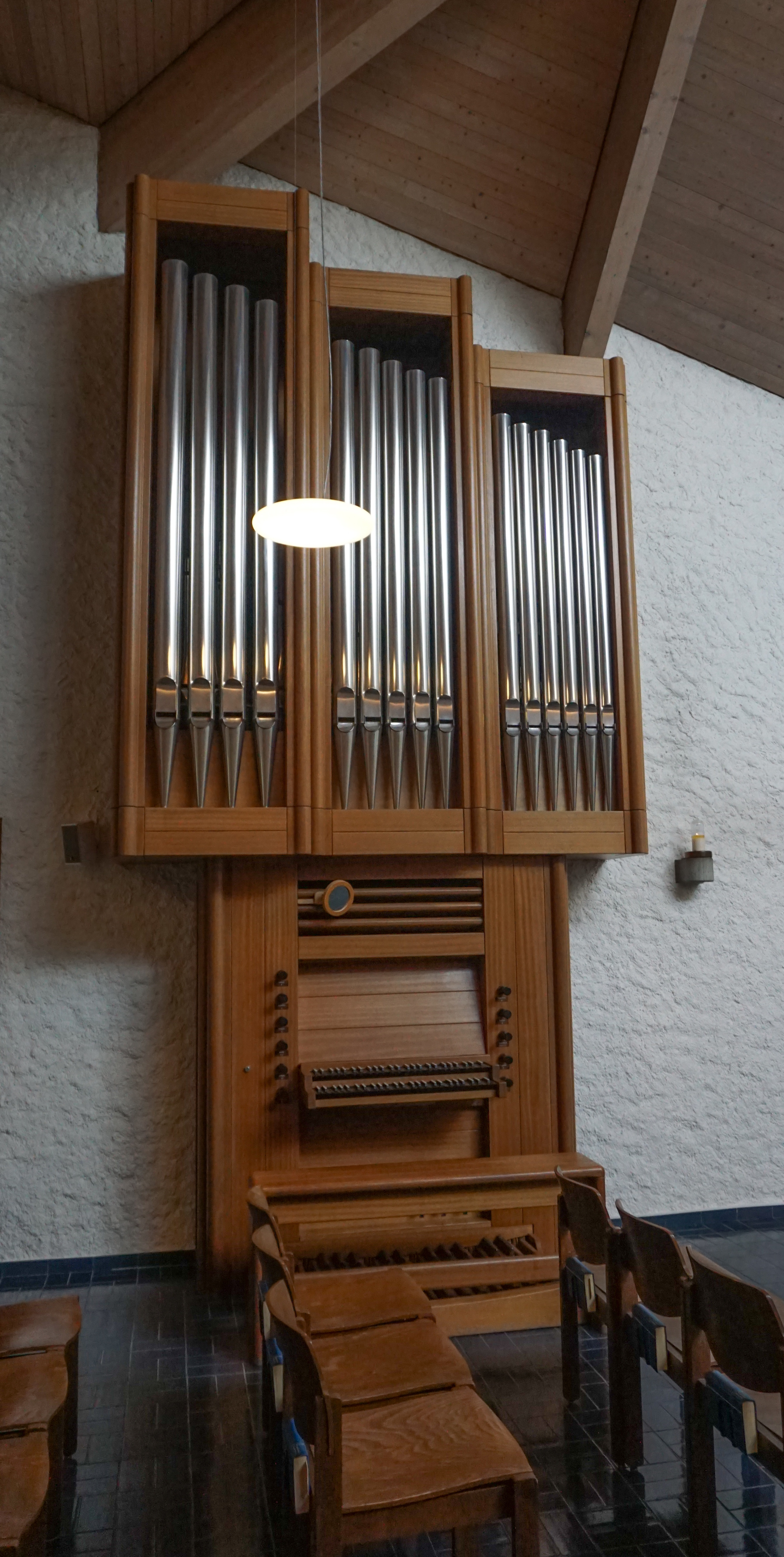 Orgel von 1989, erbaut durch Erwin Erni, Stans